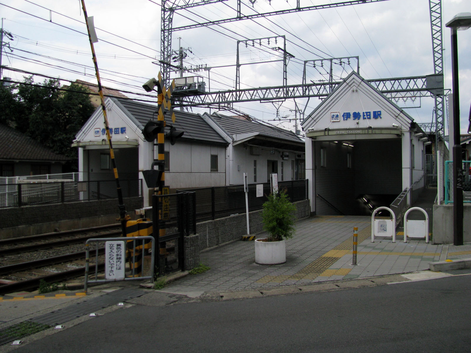 近鉄線伊勢田駅